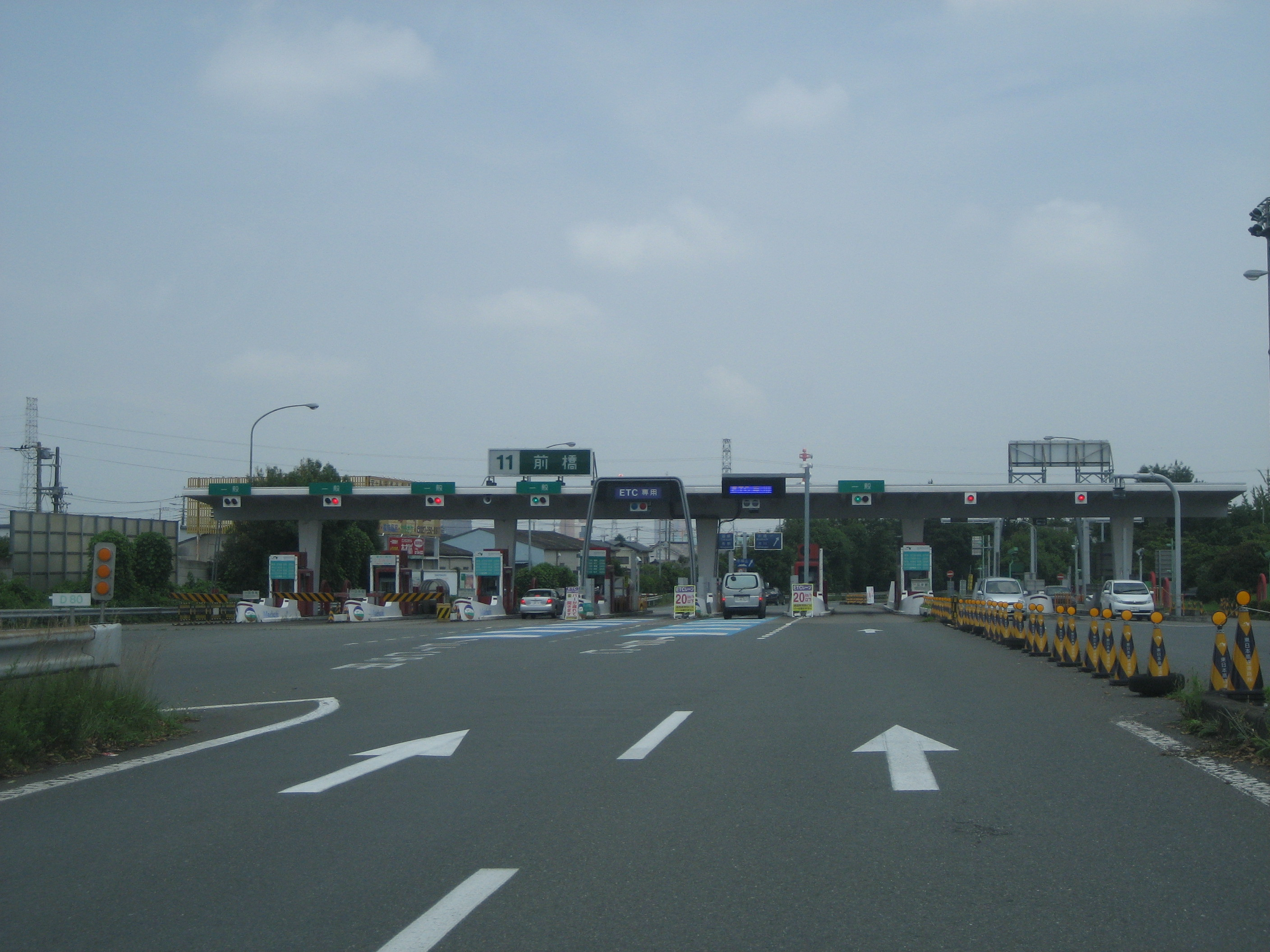 関越自動車道前橋インターチェンジ料金所